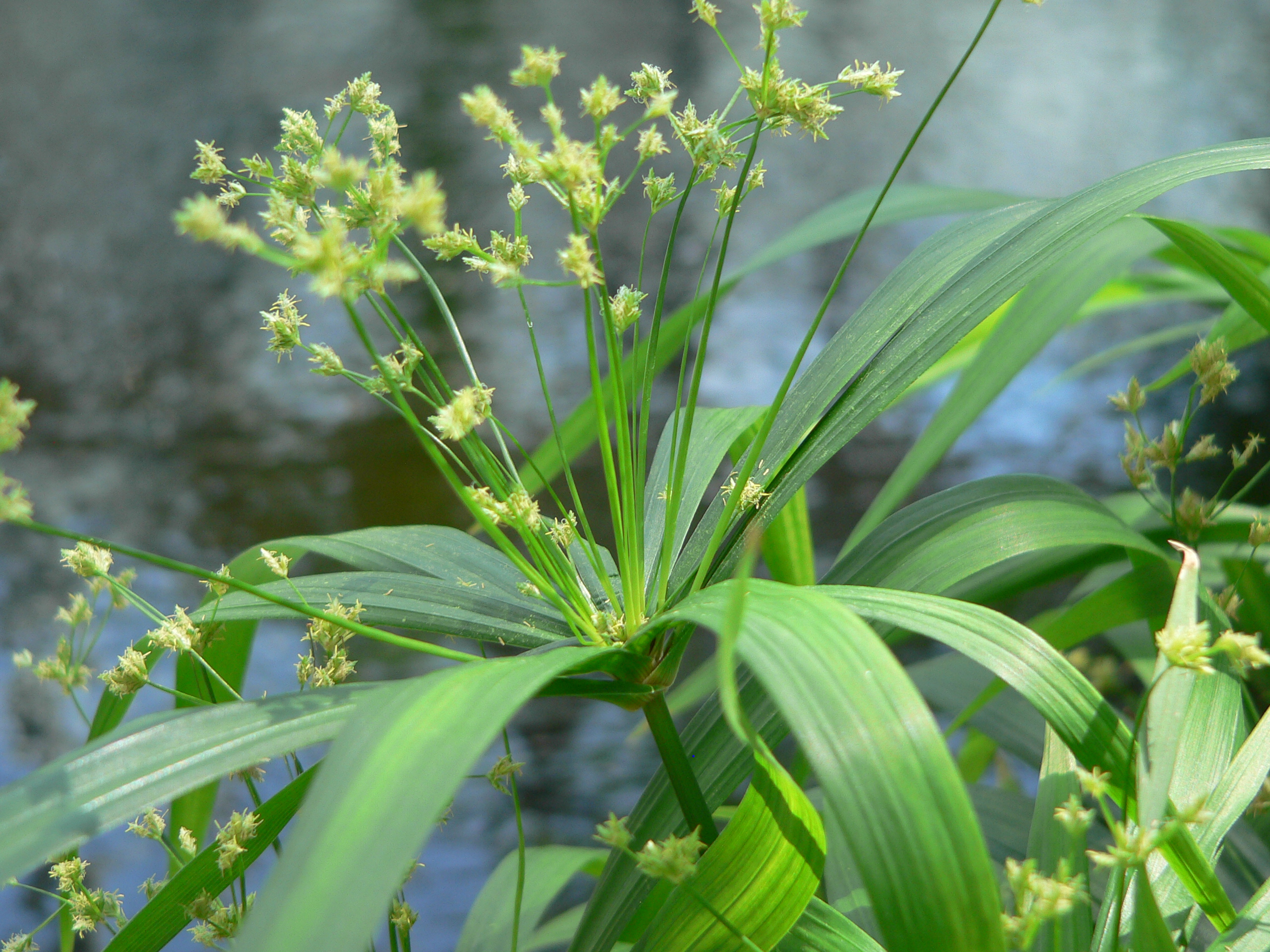 Cyperus diffusus albostriatus